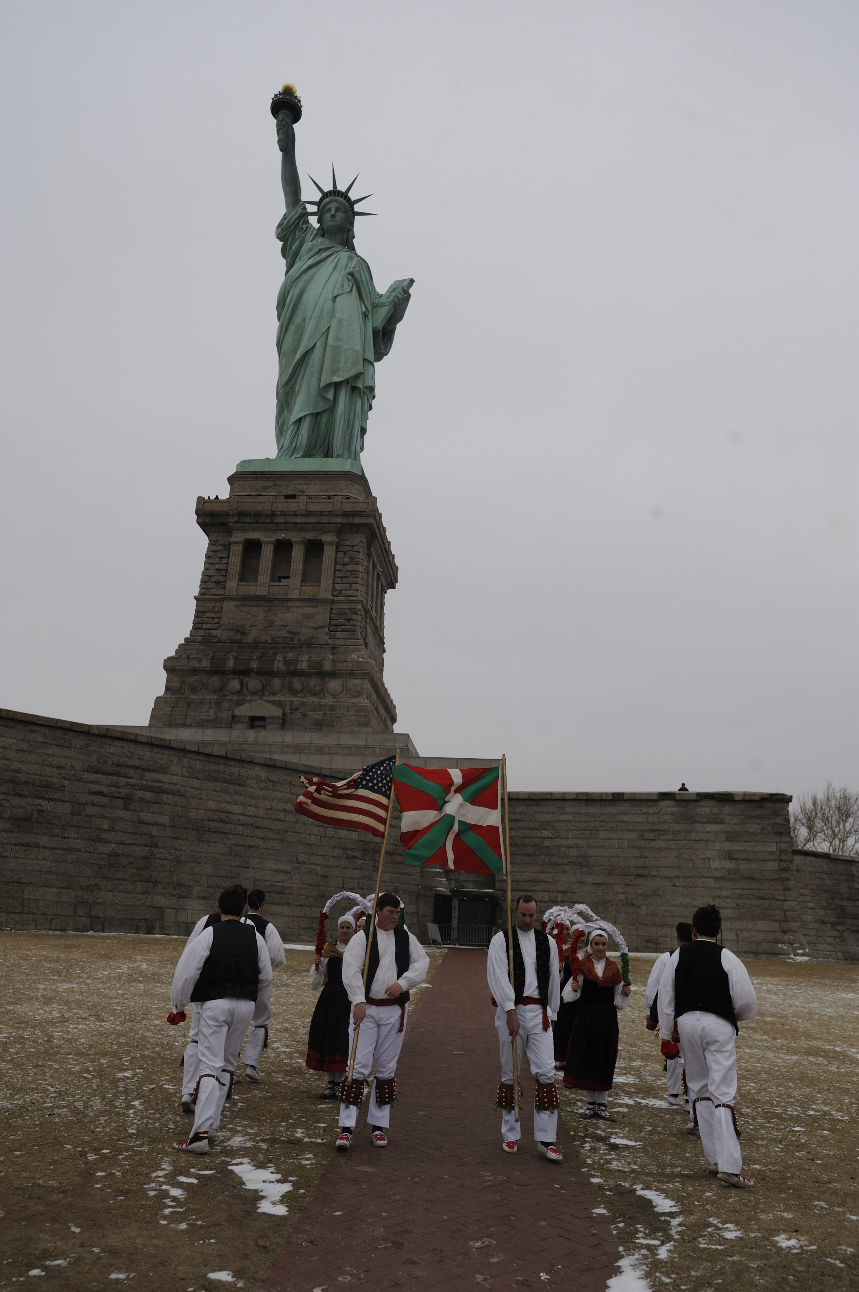 Ellis Island homenajea a los emigrantes vascos en la inauguración de la exhibición "Hidden in Plain Sight: The Basques" . A la inauguración acudieron, además de Guillermo Echenique, Secretario General de Acción Exterior del Gobierno Vasco, Julián Celaya, Director para los Ciudadanos y las Colectividades Vascas en el Exterior, Patricia Lachiondo, Presidenta del Museo y Centro Cultural Vasco de Boise, y el Cónsul General, Fernando M. Villalonga, entre otros. En la apertura de esta exhibición, en la que colaboran el Gobierno Vasco y el Museo Vasco de Boise, Idaho, tomaron parte la solista donostiarra Amaia Arberas, el coro Bihotzetik y el grupo de dantzaris Oinkari, ambos procedentes de Idaho. Las actuaciones tuvieron lugar en Ellis Island y frente a la Estatua de la Libertad, lugares emblemáticos en la historia de los Estados Unidos.